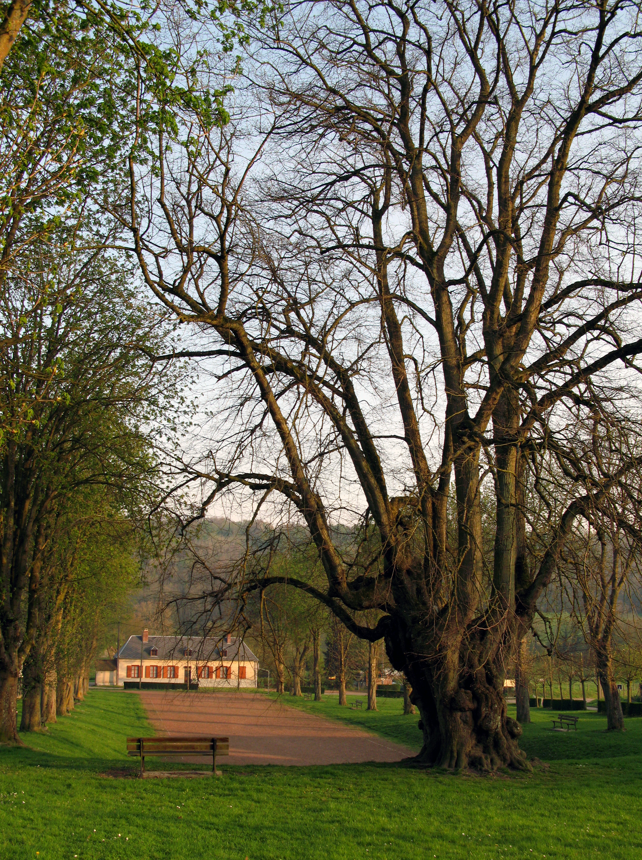 Lucheux (Somme, France) - L'arbre des épousailles, vu depuis le côté du calvaire et du monument aux morts. . . .